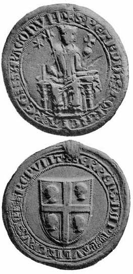 Creu d'Alcoraz de la Butlla de plom de Pedro II "el Gran"